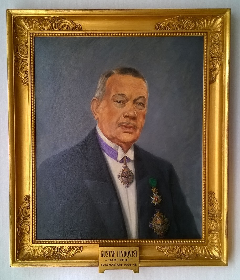 Borgmästaren i Mariefred 1906-1946, Gustaf Lindqvist (1872-1946). Porträttmålning i Mariefreds rådhus, nuvarande biblioteket.